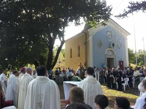 Festa dell'incoronazione, ultima domenica di luglio